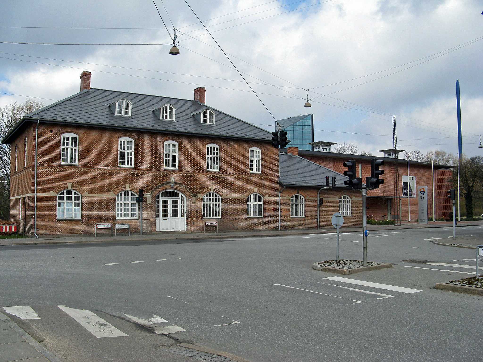 Bymuseet i i den tidligere Hammebanegård i Århus, set fra syd